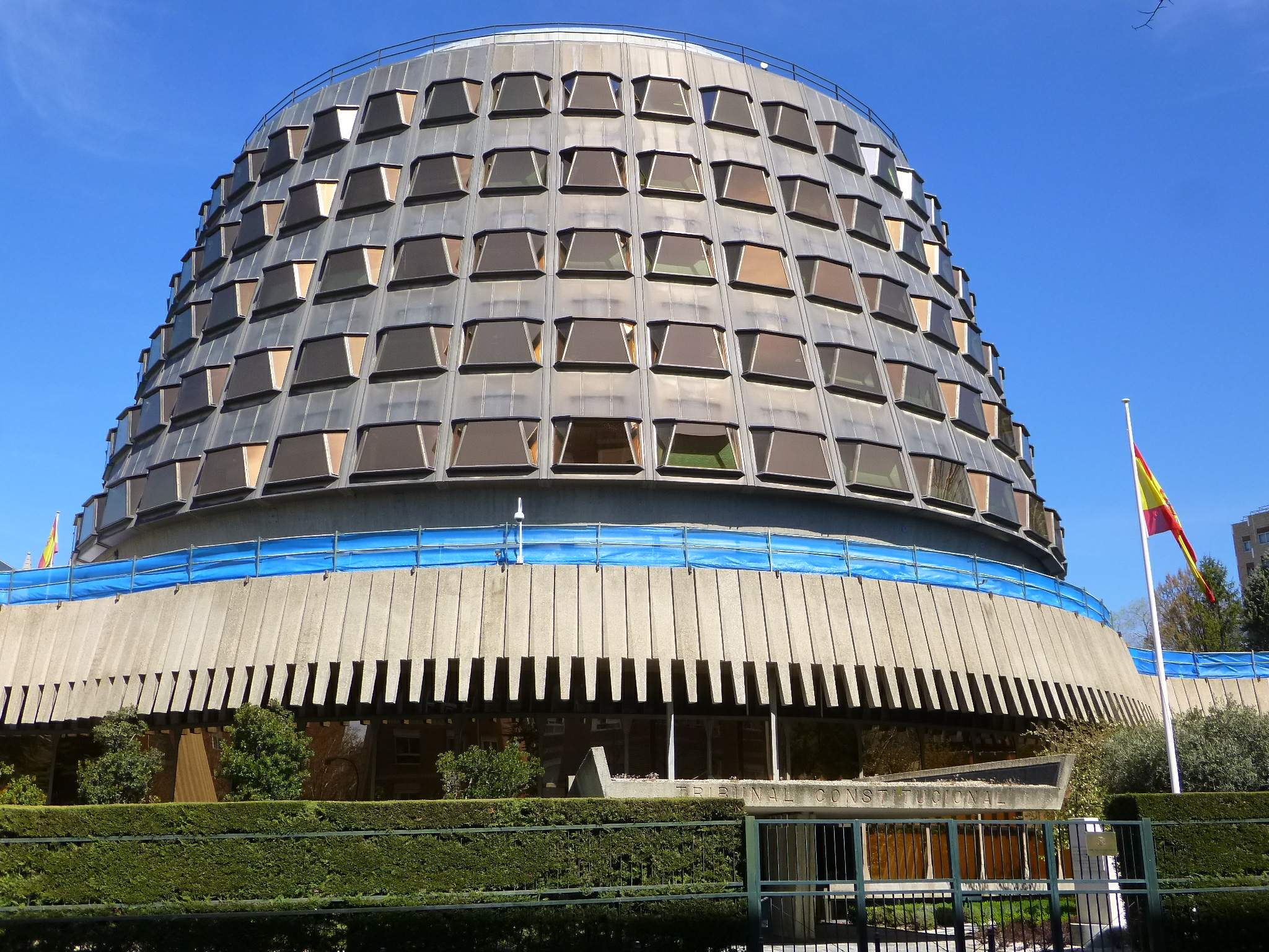 Tribunal Constitucional de España (Madrid)